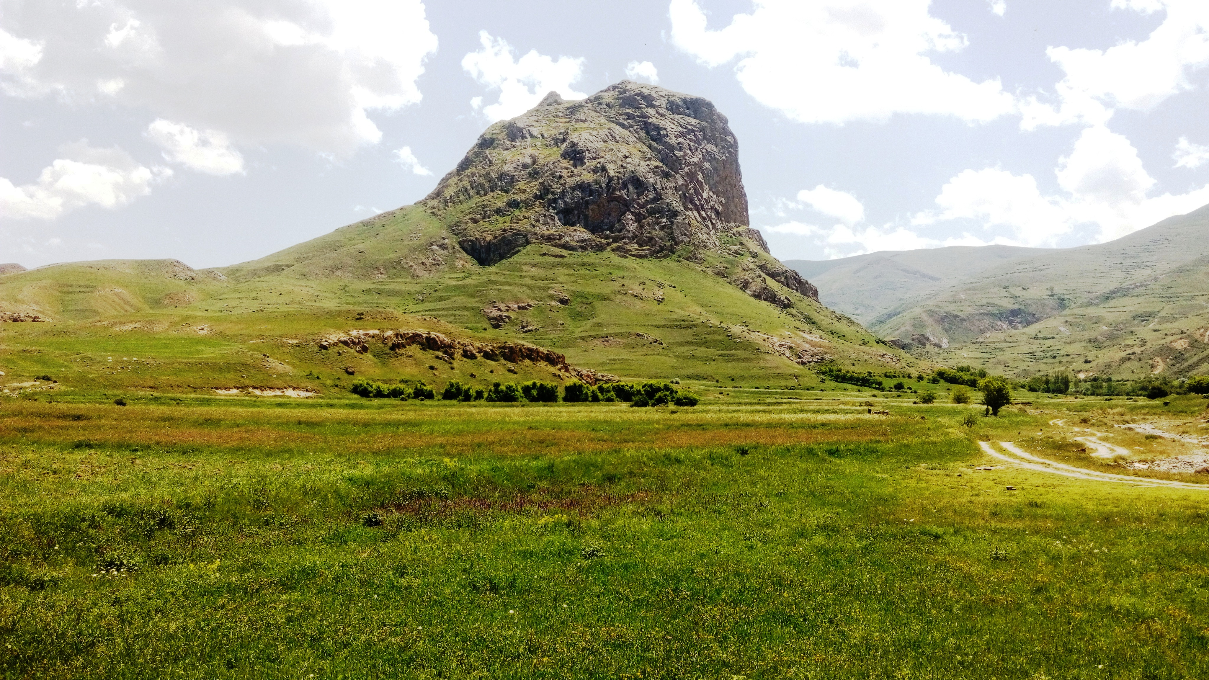 عکس از قلعه جوشین (جوشون قالاسی)از سمت مزارع جوشین (جوشون چایی) گرفته شده است